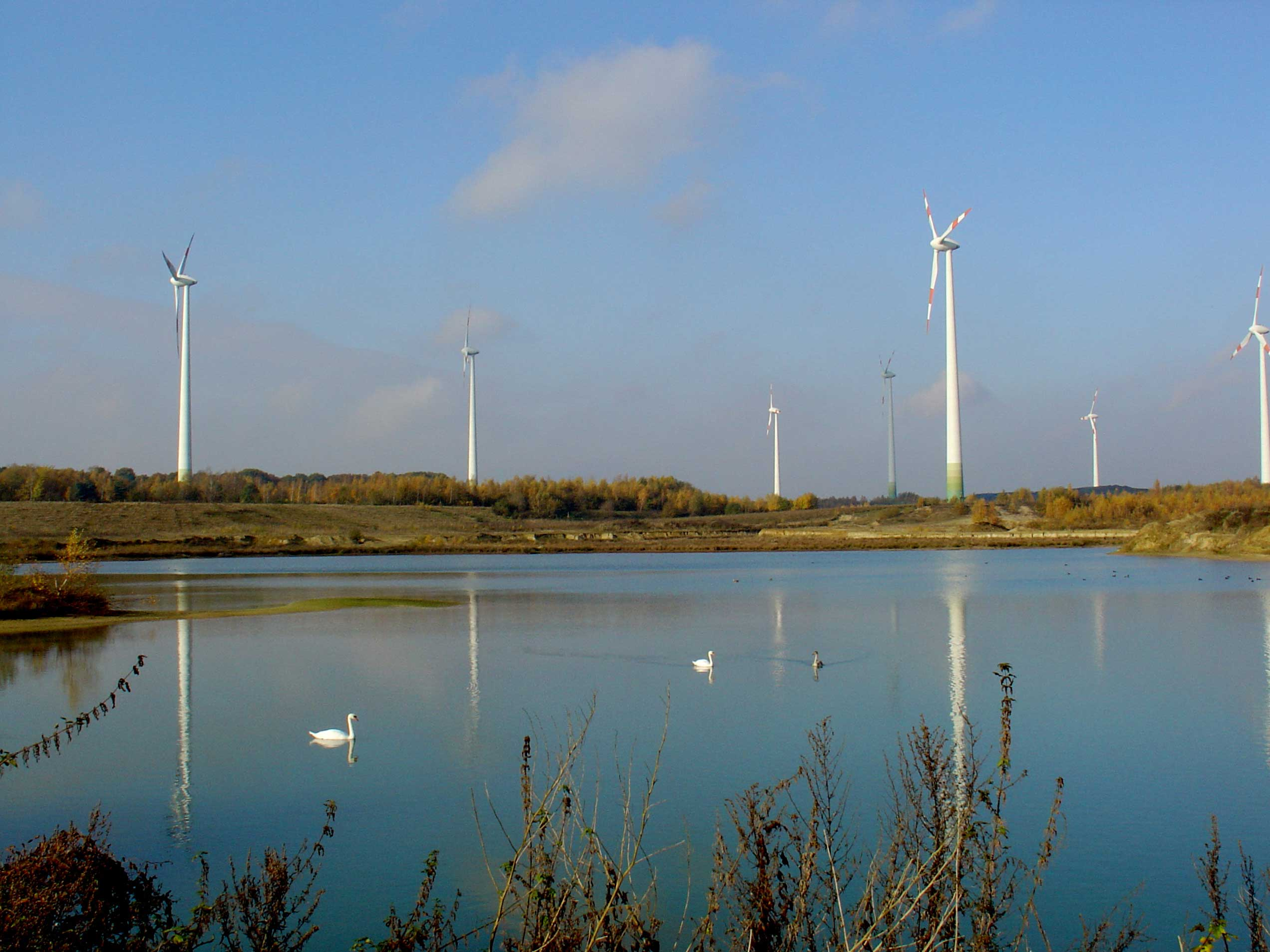 Tussen Haftenkamp en Hardinghausen